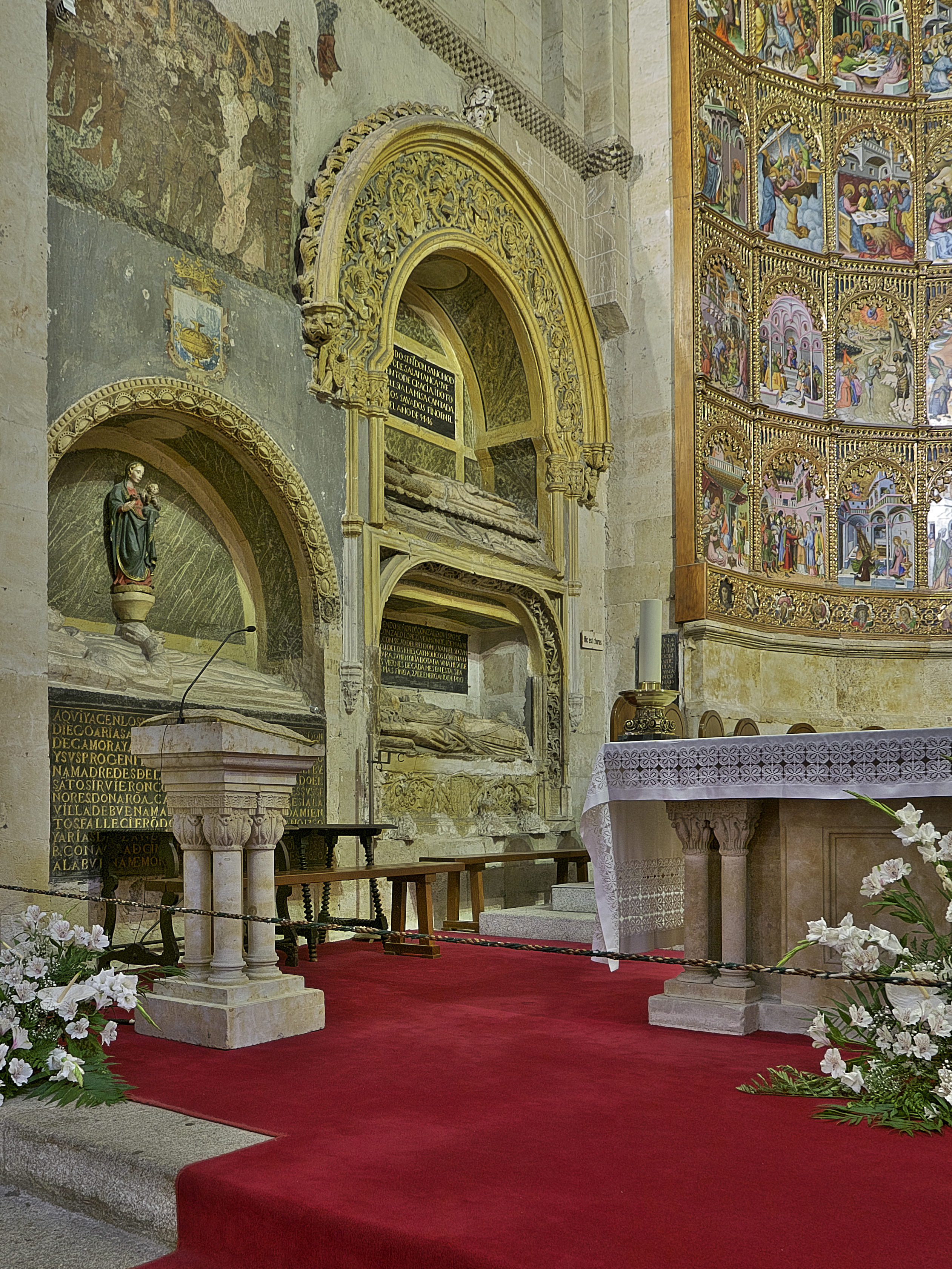 Muro del Evangelio. Sepulcros de don Sancho de Castilla, obispo de Salamanca; Gonzalo de Vivero, obispo de Salamanca; Diego Arias Maldonado, arcediano de Toro, y Arias Diez Maldonado.